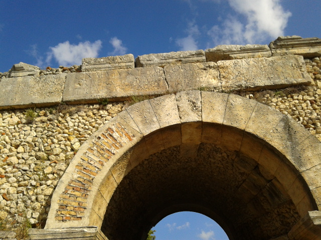 Iscrizioni latine sulla volta dell'ingresso settentrionale